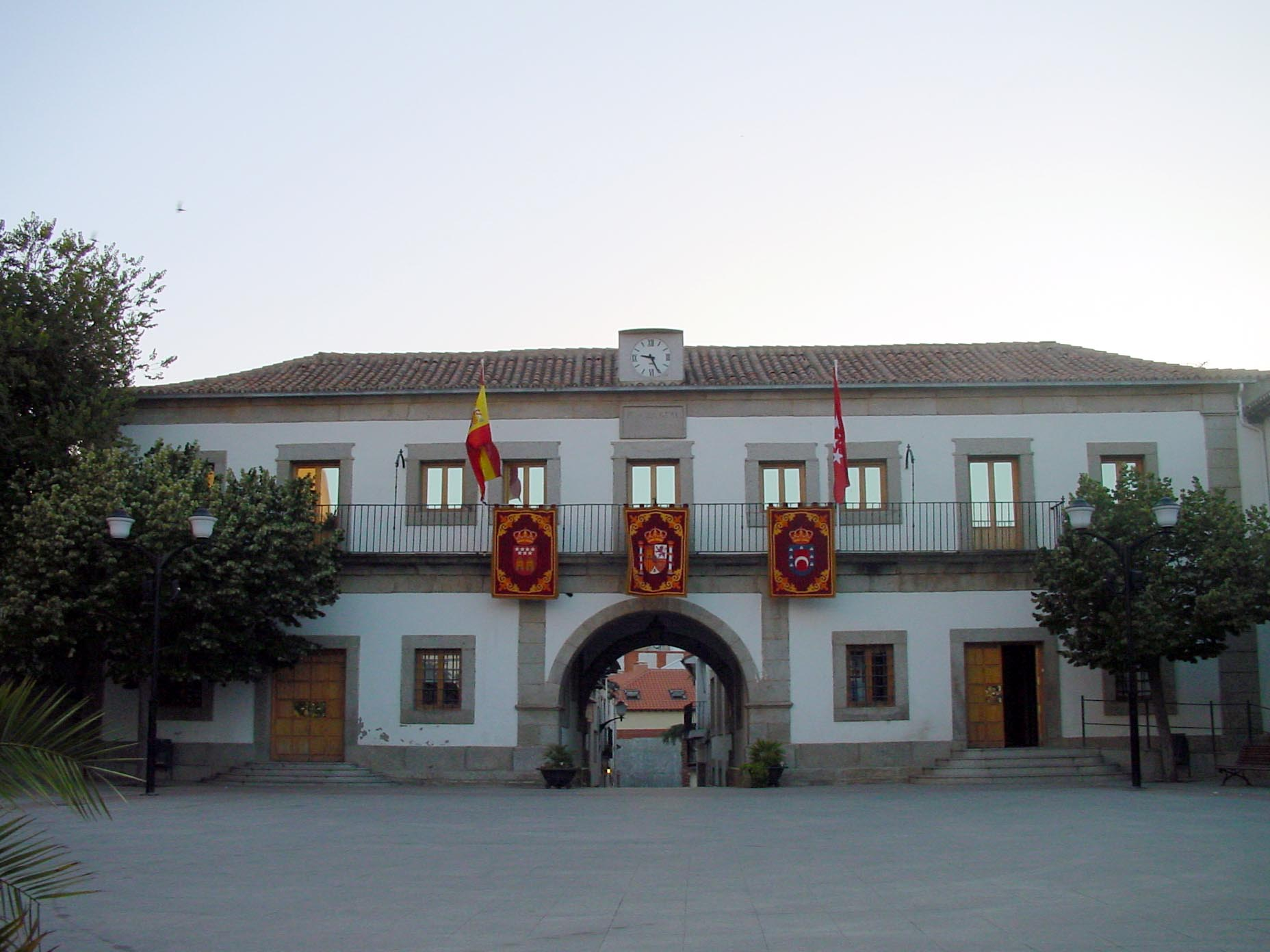 Ayuntamiento de San Martín de Valdeiglesias